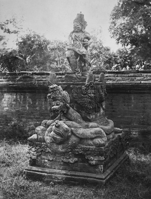 Foto. Op de achterzijde staat met potlood geschreven 'Schildpad Krobokan'.. Beeld van Rawana en van Bedawang Nala en een naga, mogelijk Ananthaboga of Basuki in de hindoeïstische tempel van Grobogan, Bali